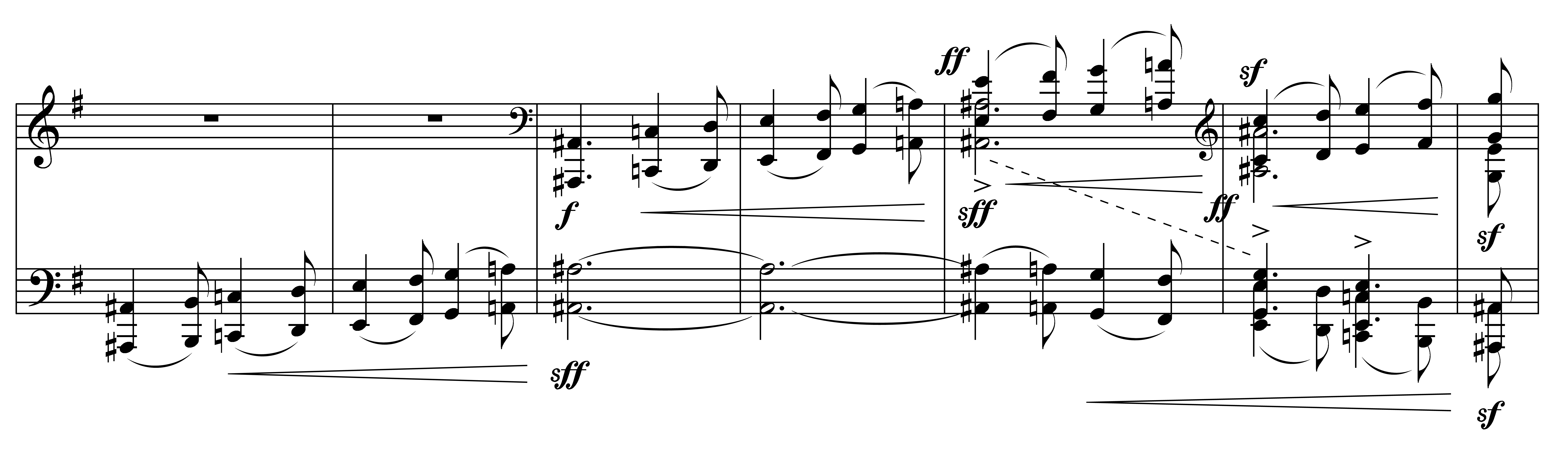 Notenbeispiel Smetana Die Moldau St.Johann-Stromschnellen T. 273-279